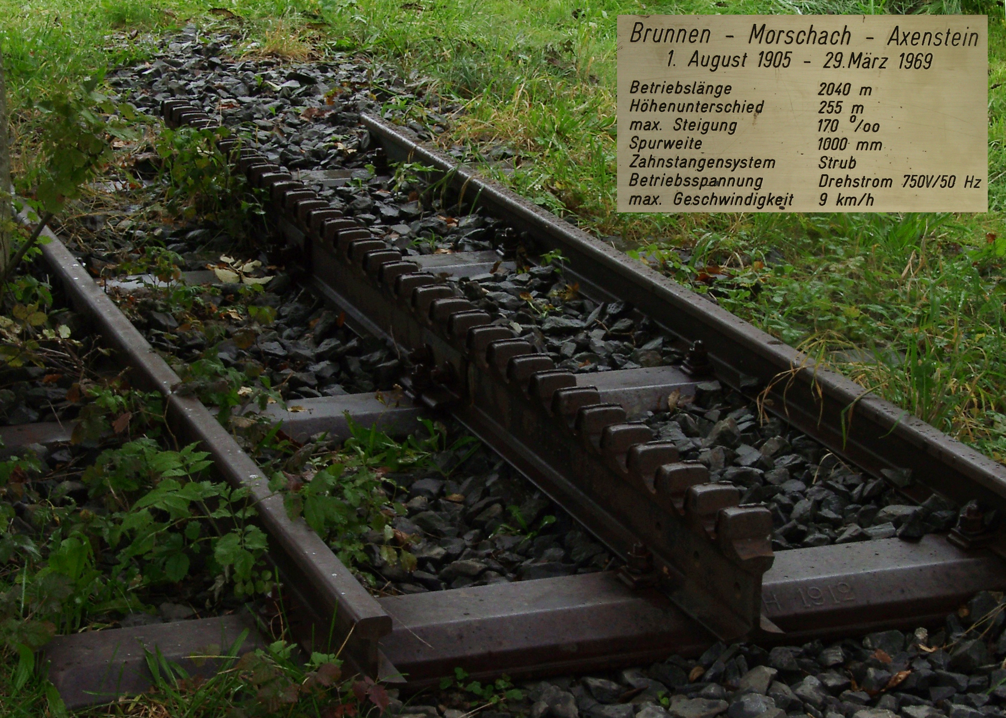 Schienenrest und technische Daten der Brunnen–Morschach-Axenstein-Bahn in Morschach, Schweiz, Kanton Schwyz